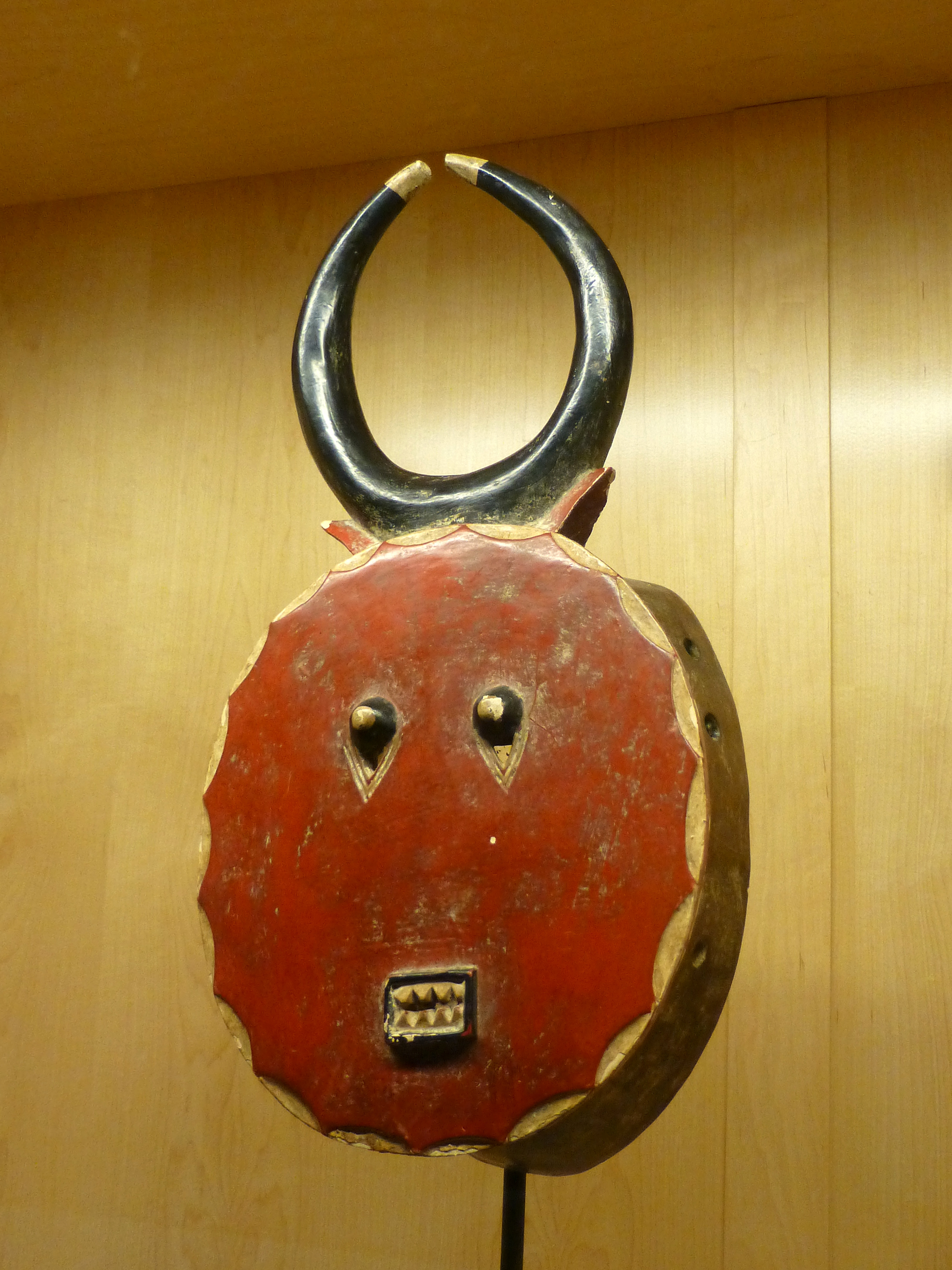 Masque kplé kplé. Ethnie Baoulé. Côte d'Ivoire. Bois. Années 1970-1980. Objet de la collection privée de M. Barth, présenté dans le cadre d'une exposition temporaire au Musée alsacien de Strasbourg.